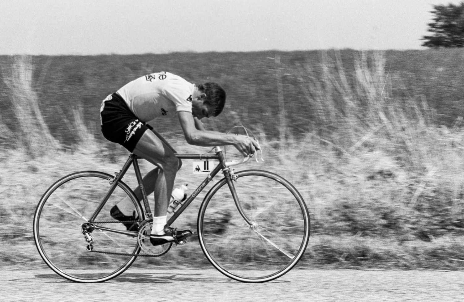 Lucien Van Impe durant le Tour de France 1976. Photographie : René Milanese